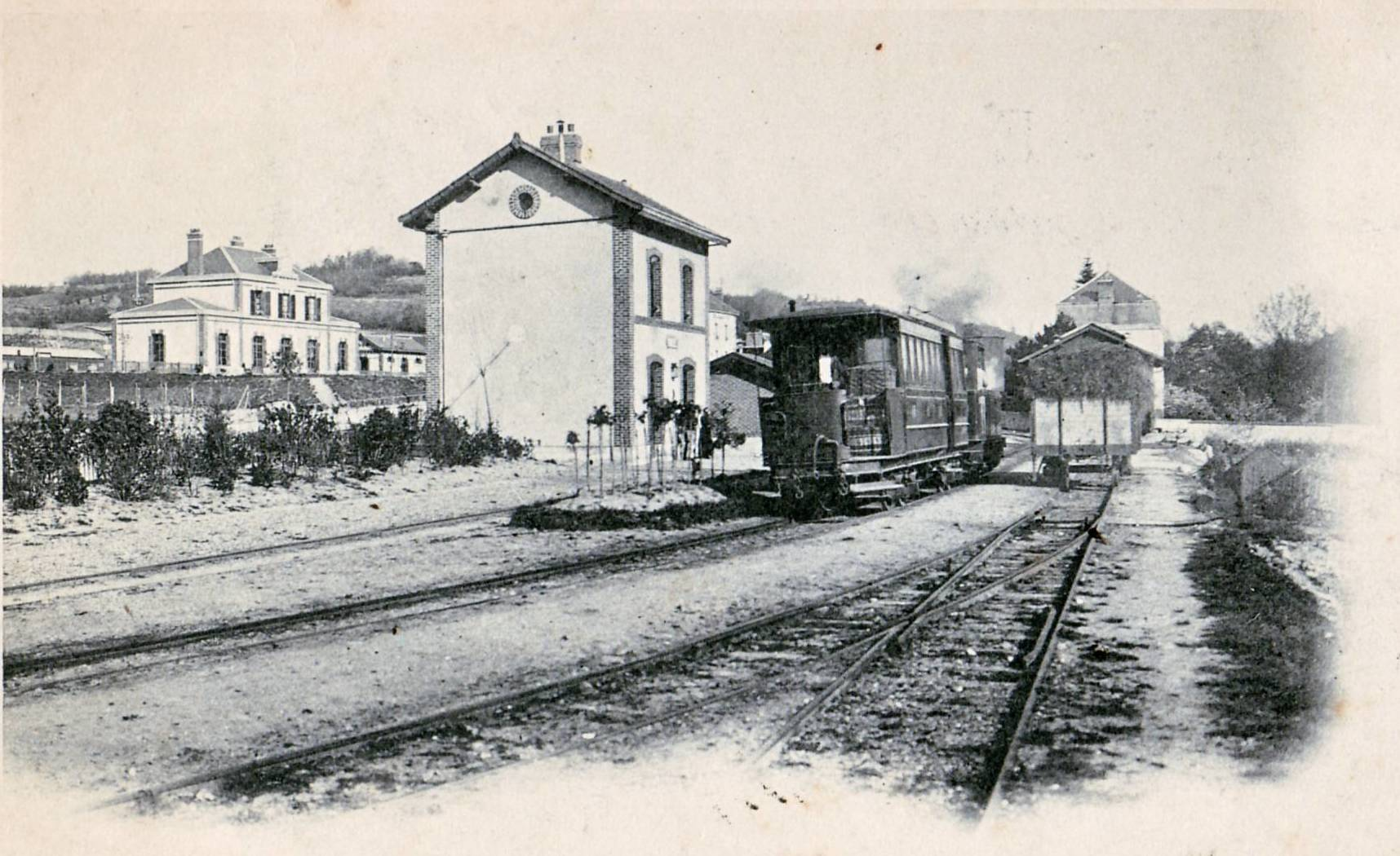 Carte postale ancienne éditée par BourdierMAULE (Yvelines - Île-de-France - France) : La gare du Chemin de fer et du tramway)Il s'agit du Tramway de Versailles à Maule